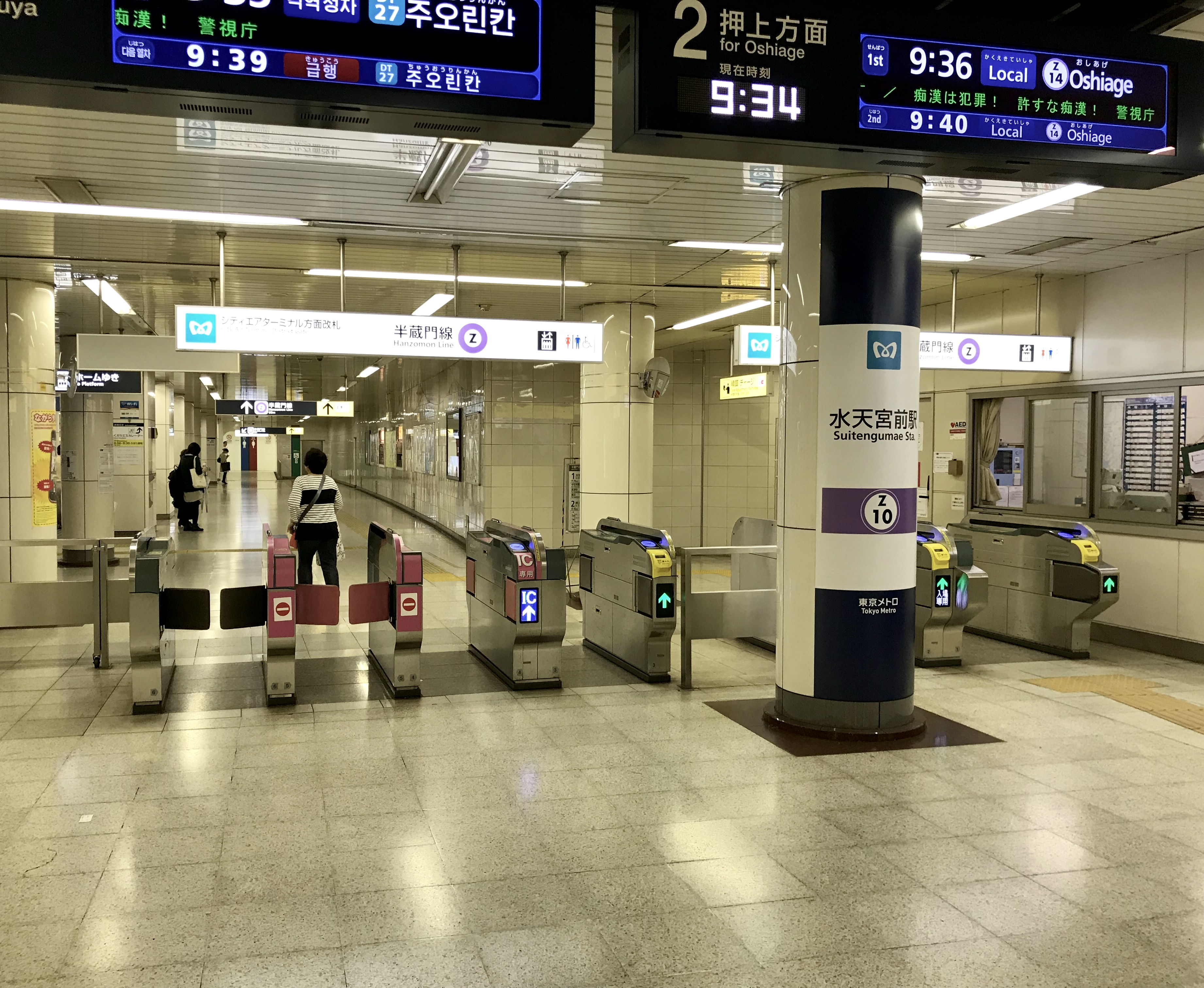 東京メトロ半蔵門線水天宮前駅シティエアターミナル方面改札口